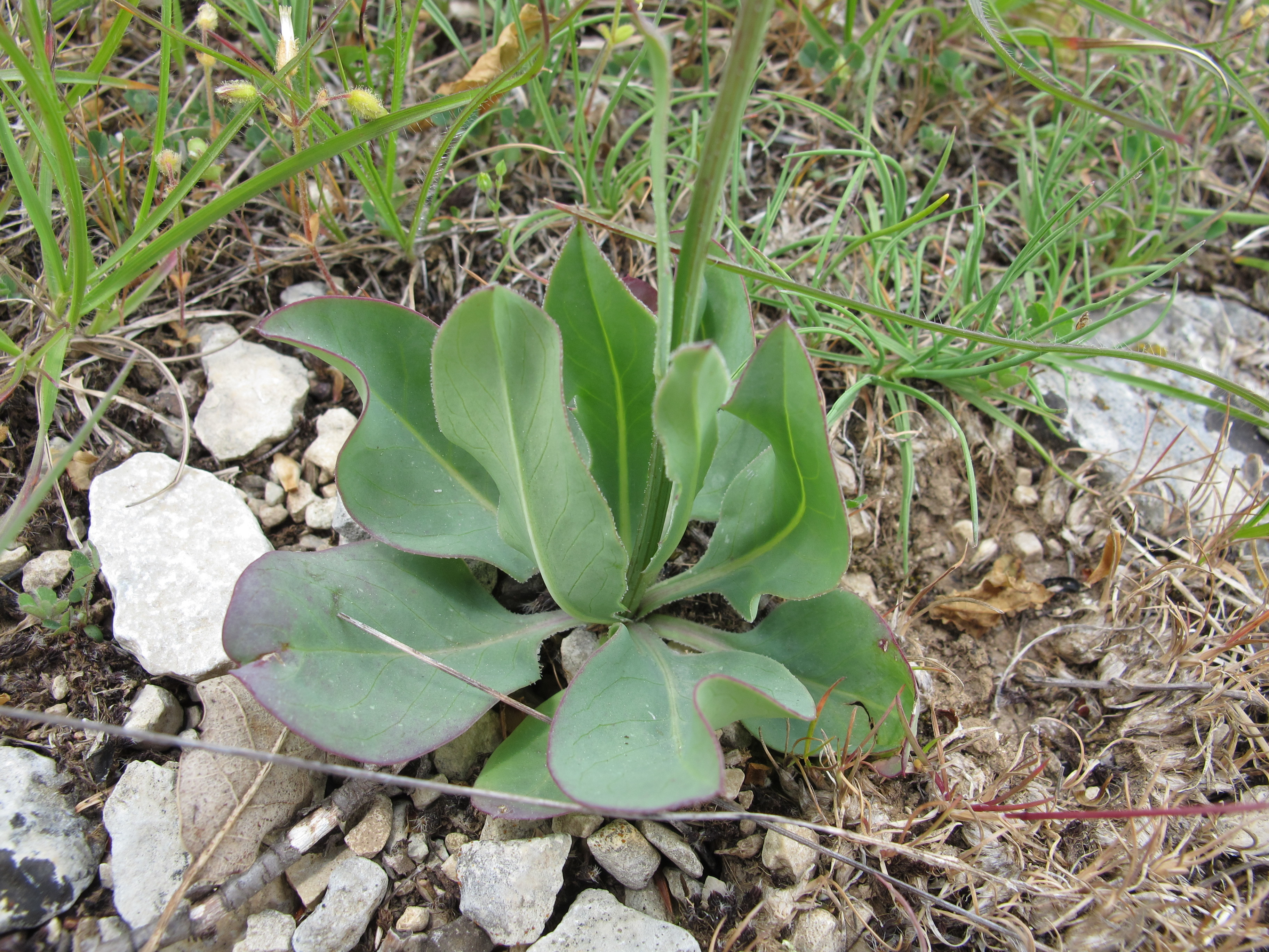 Klasea nudicaulis - Roseta basal de hojas - Auribeau (Departamento de la Vaucluse, Francia).